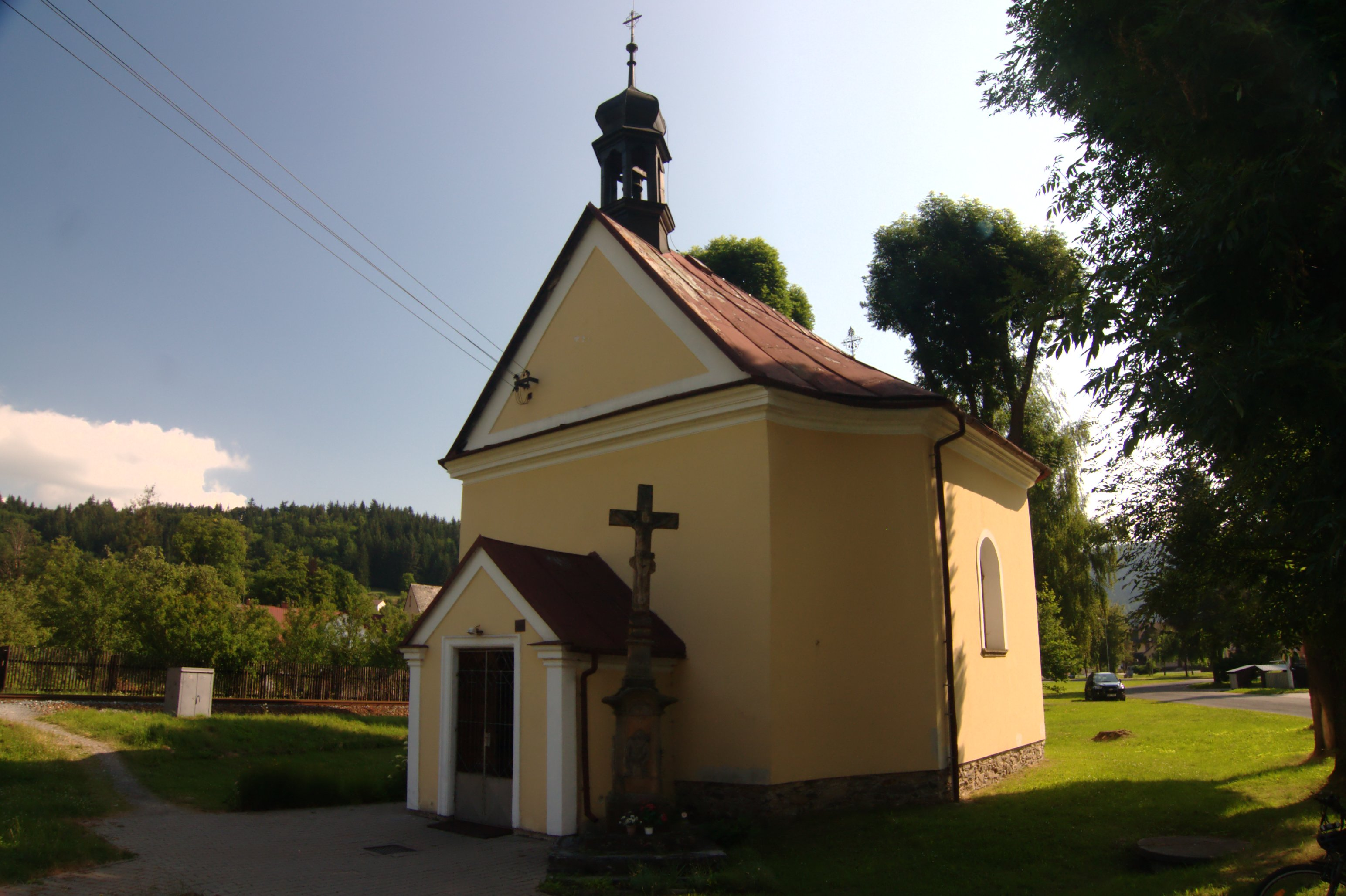 Kaple Obětování P. Marie (Hanušovice)